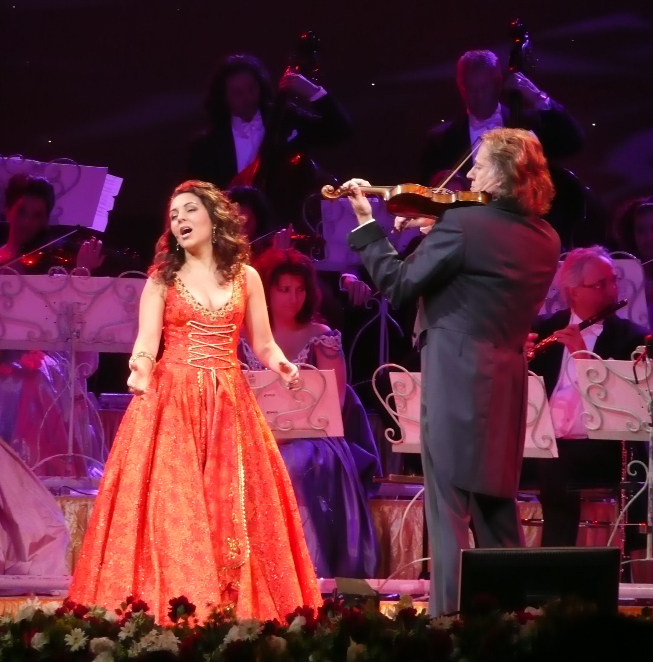 Carmen Monarcha und Andre Rieu (Düsseldorf, 10. Januar 2009)